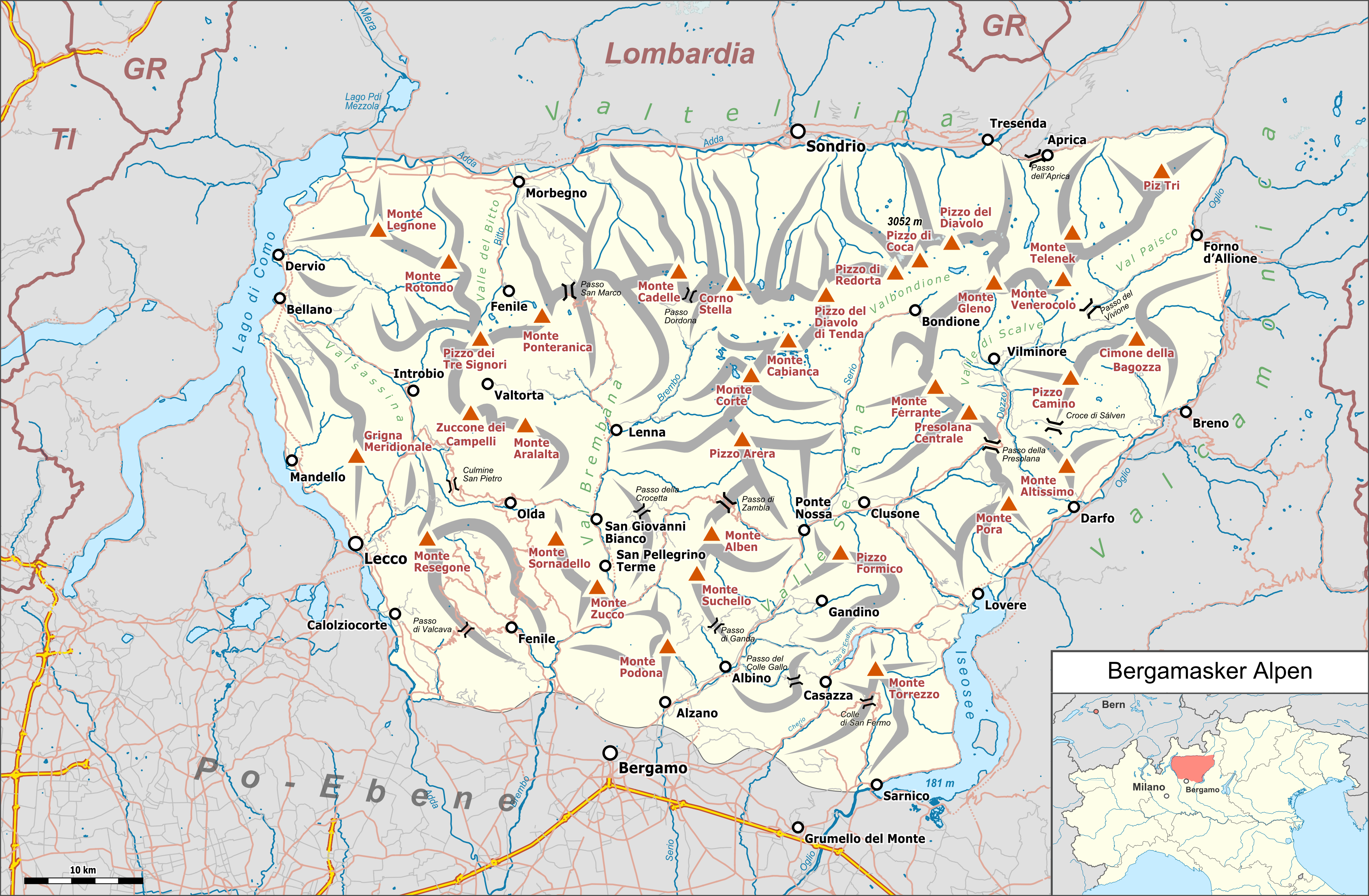 Übersichtskarte der Bergamasker Alpen